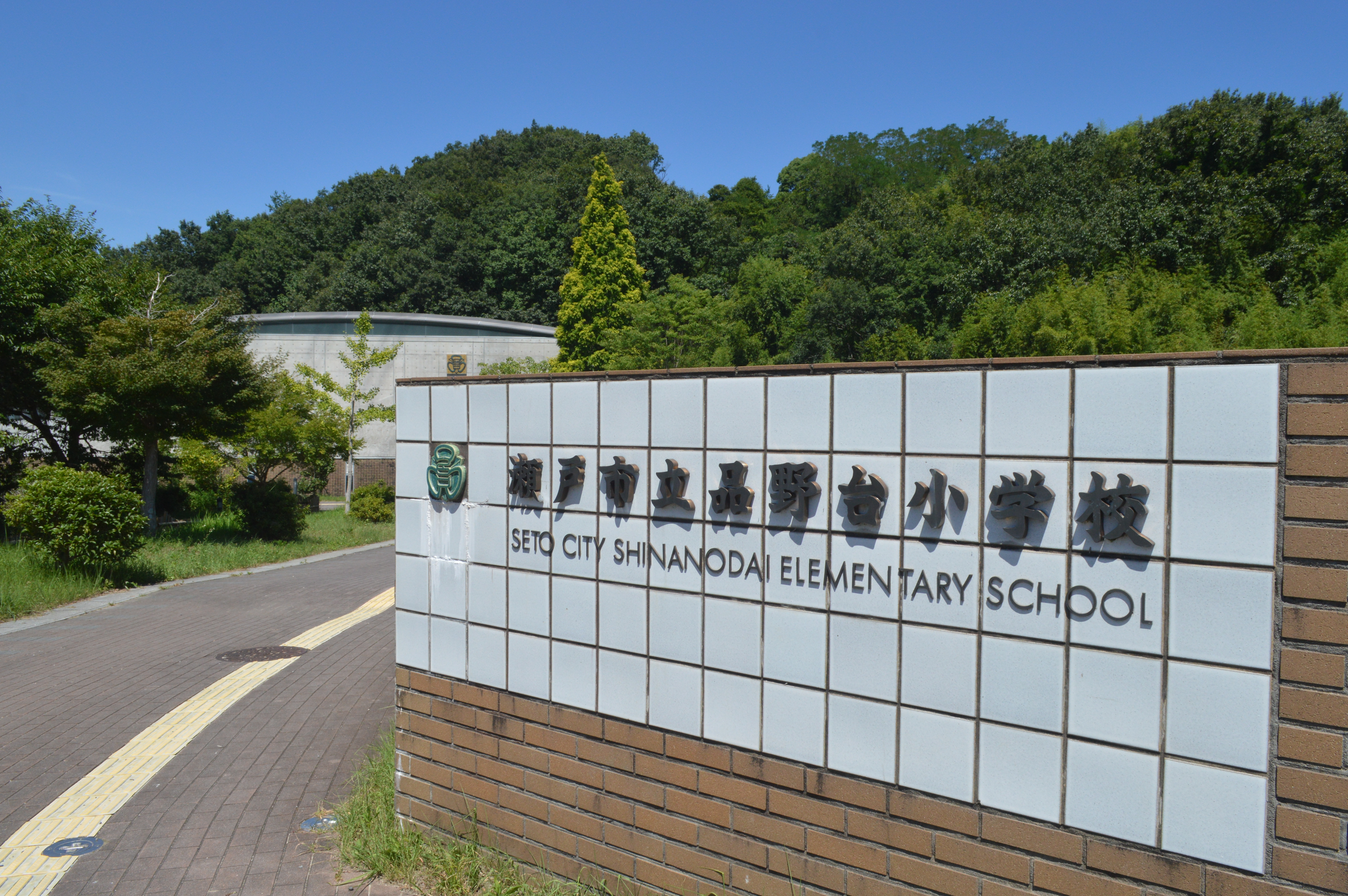 愛知県の瀬戸市立品野台小学校。地域図書館が開放されている日曜日に撮影。